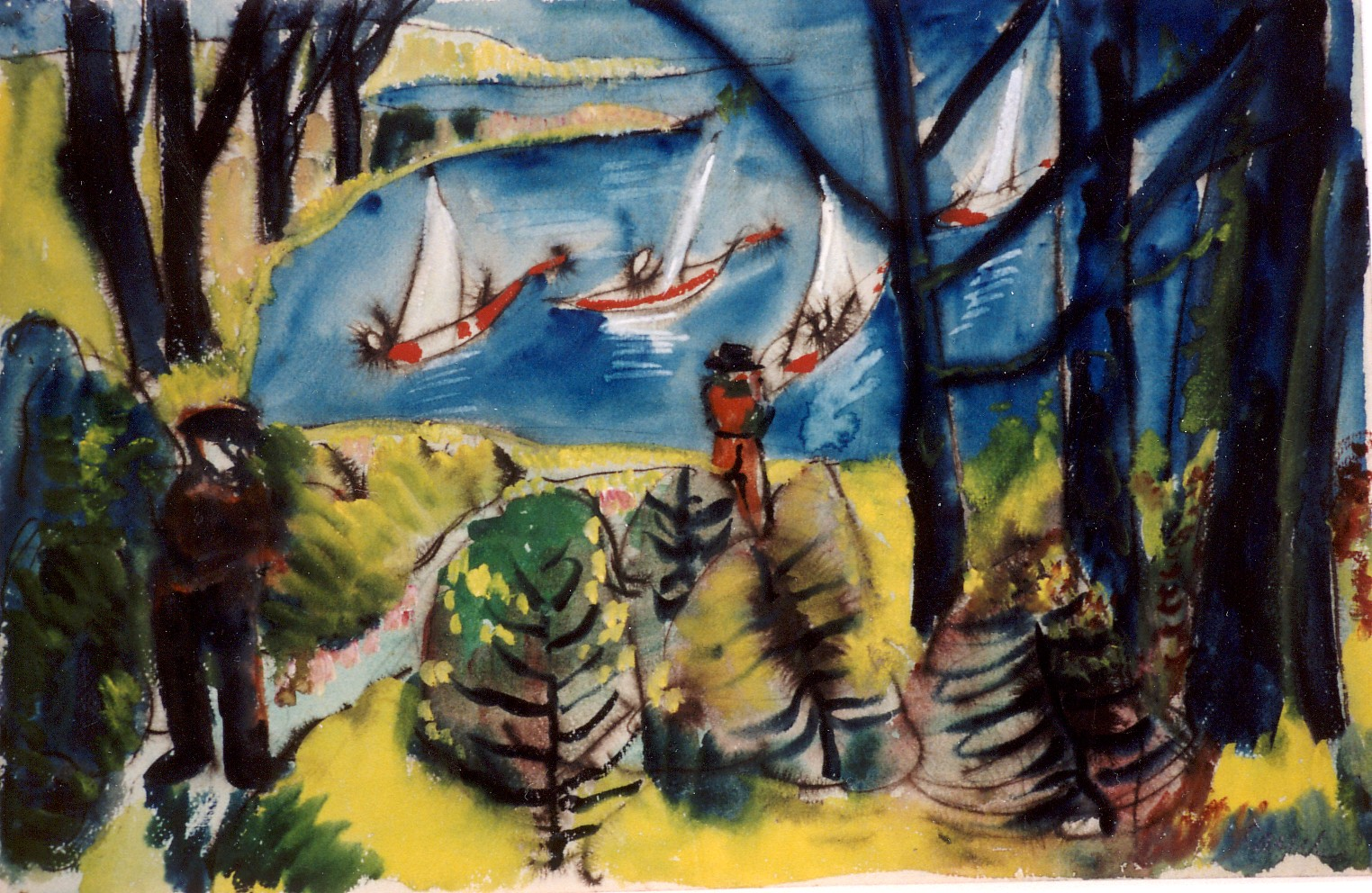 Aquarell Fischerboote in der Bretagne von Pol Cassel, 1926